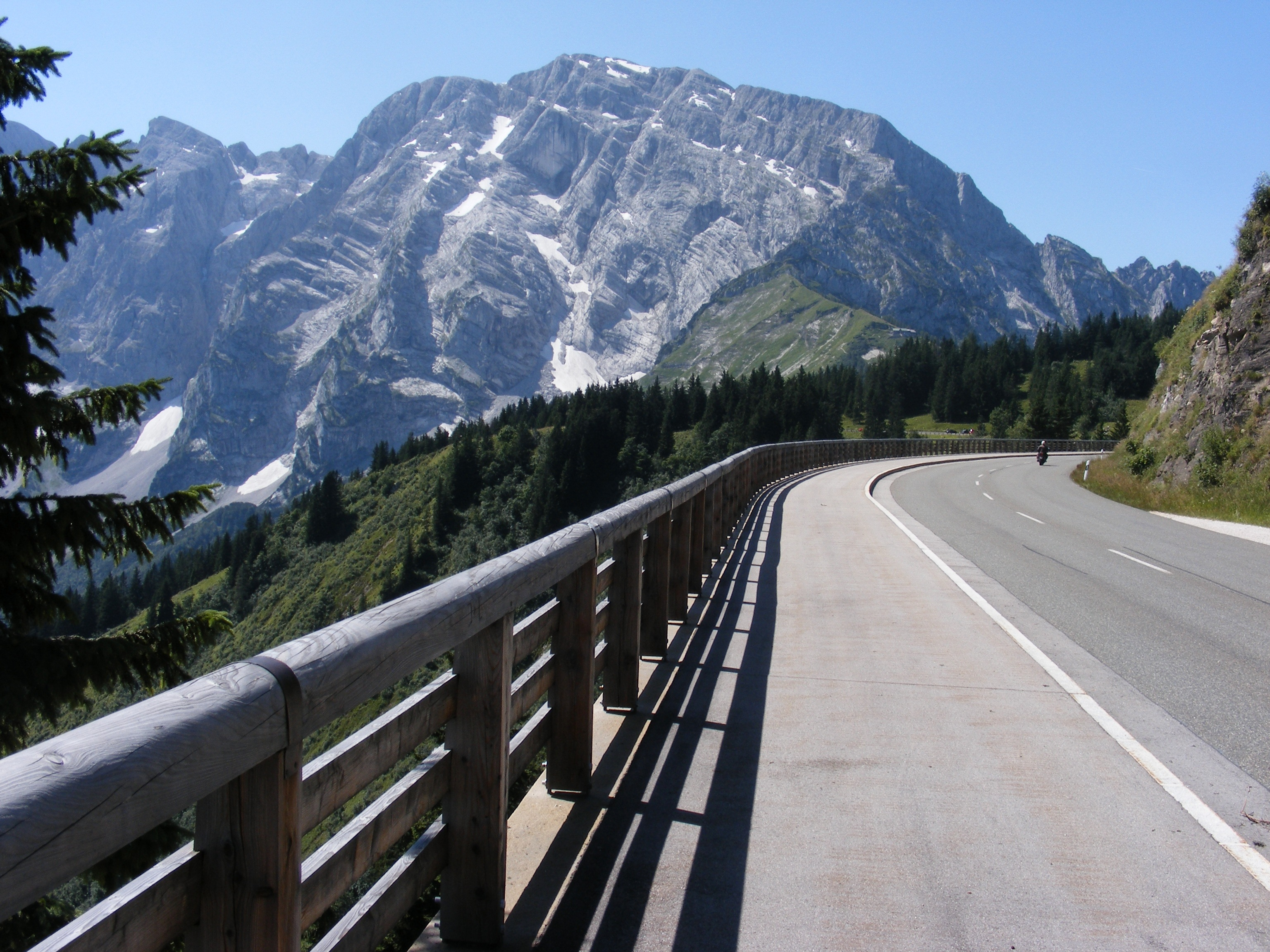 Roßfeldhöhenringstraße, Scheitelstrecke auf österreichischem Staatsgebiet, Blick auf das Göll-Massiv